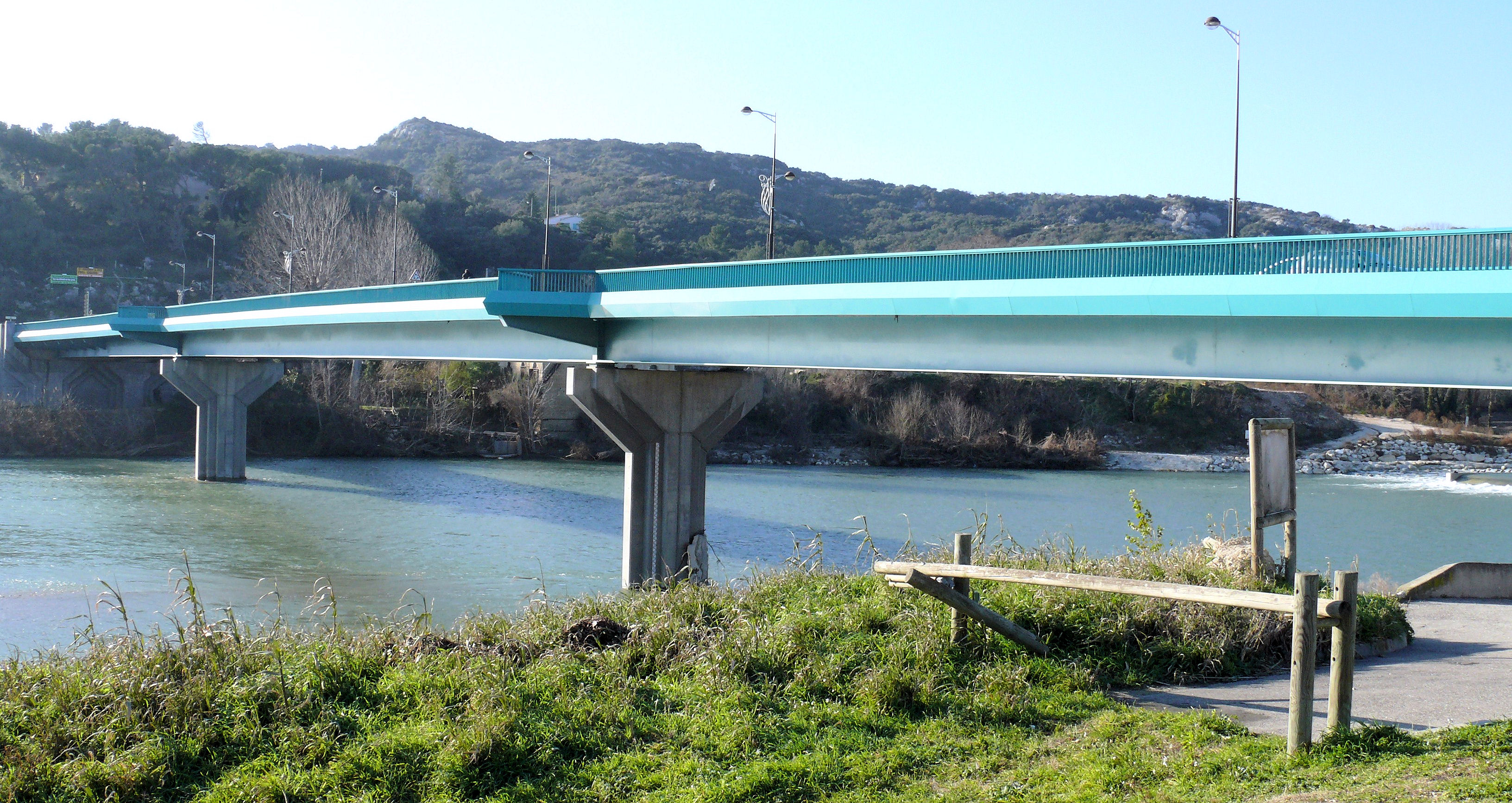 Remoulins - Pont sur le Gardon